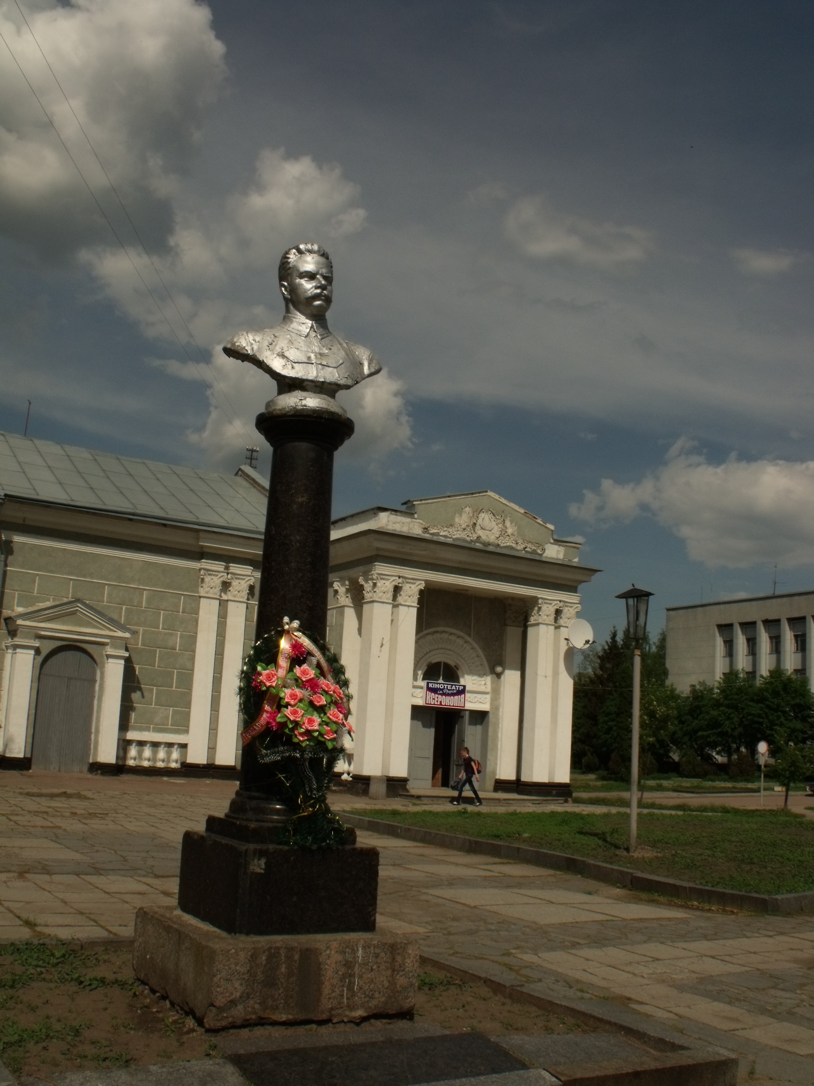 Пам'ятник Фрунзе М. І. Бердичів, Вул. К. Лібкнехта